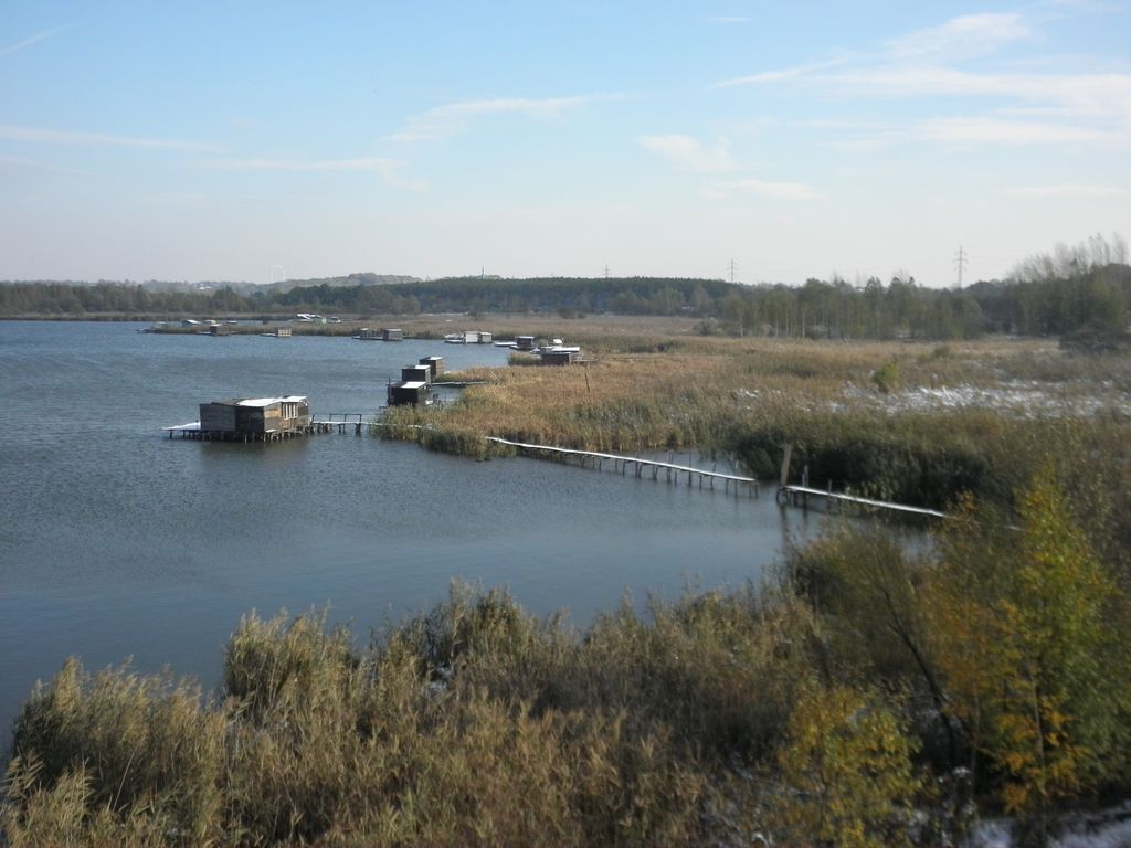 Heřmanický rybník